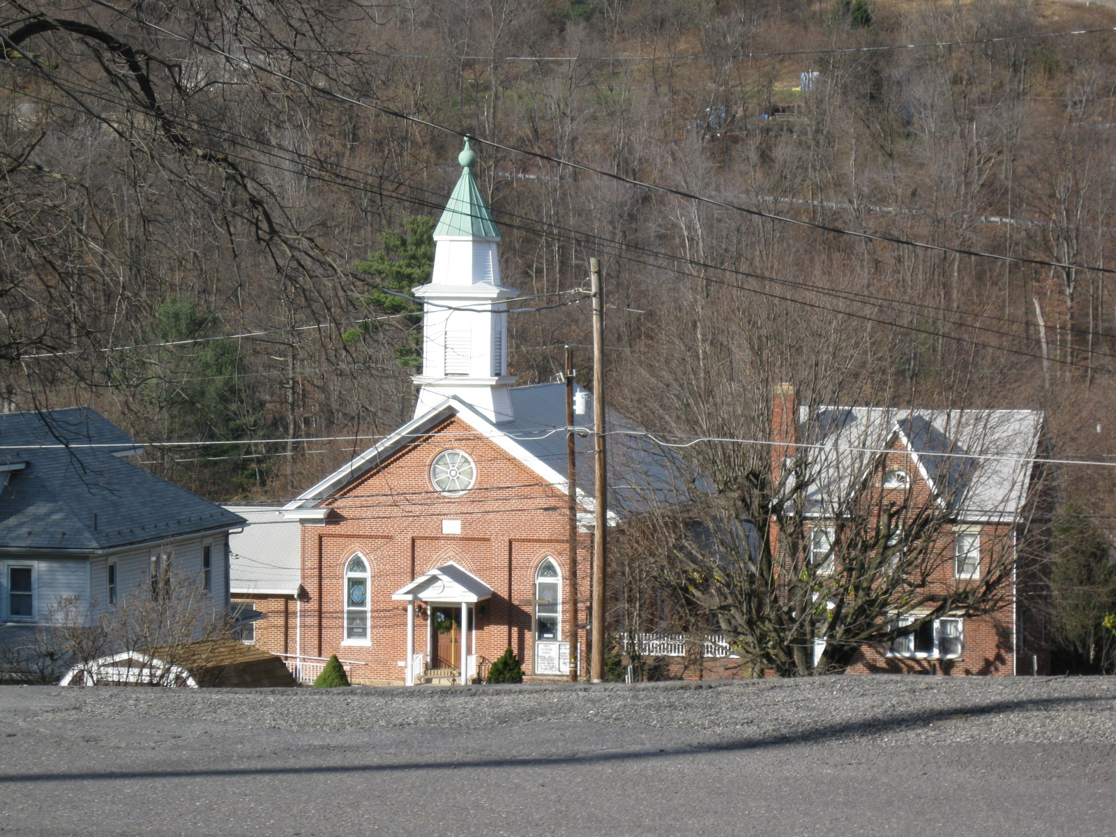 Trevorton, Pennsylvania